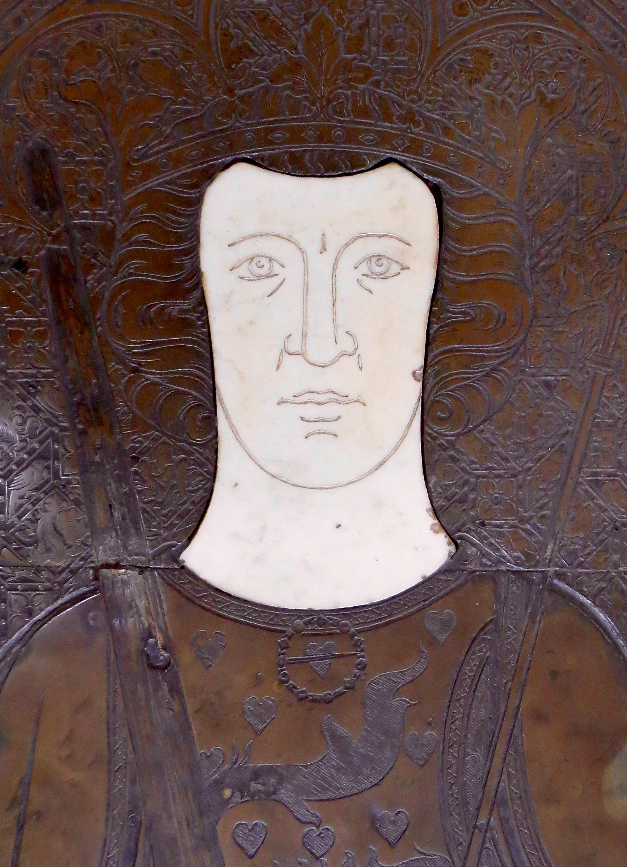 Erik Menved, detalje fra gravmæle i Sankt Bendts Kirke, Ringsted, Sjælland